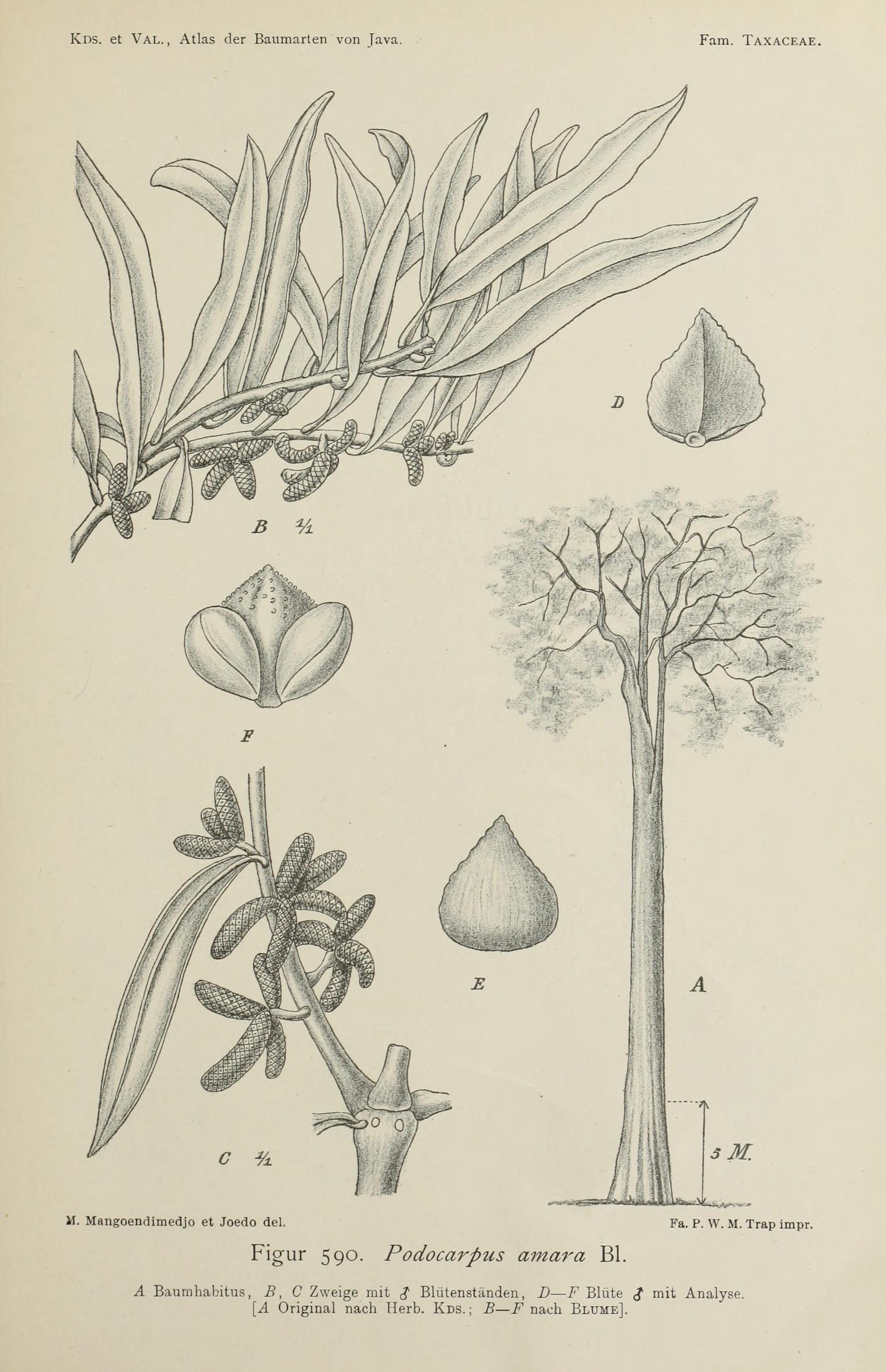 Atlas der baumarten von Java : im anschluss an die "Bijdragen tot de kennis der boomsoorten van Java" / zusammengestellt von dr. S.H. Koorders und dr. Th. Valeton ; mit unterstützung der Niederländsch- indischen regierung ; Herausgegeben von dr. S.H. Koorders.